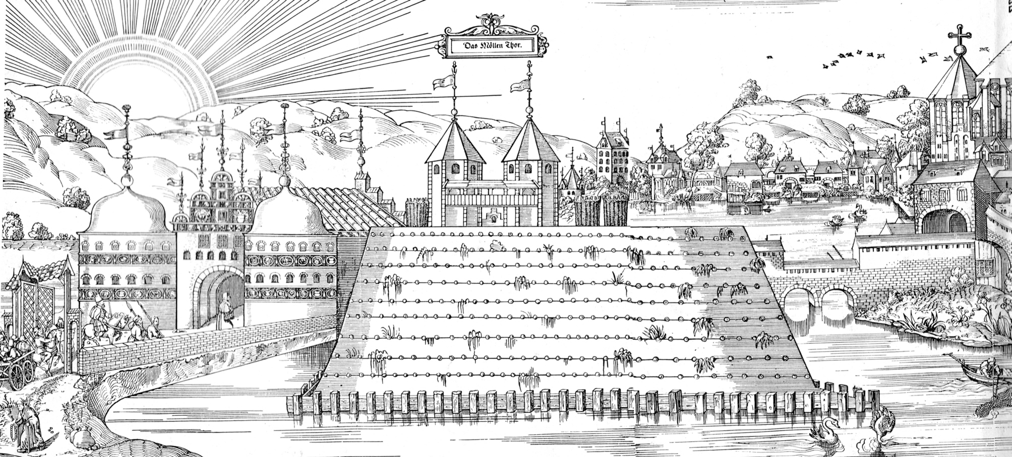 Die Mühlentoranlage in Lübeck im 16. Jahrhundert, dargestellt auf der Lübecker Stadtansicht des Elias Diebel